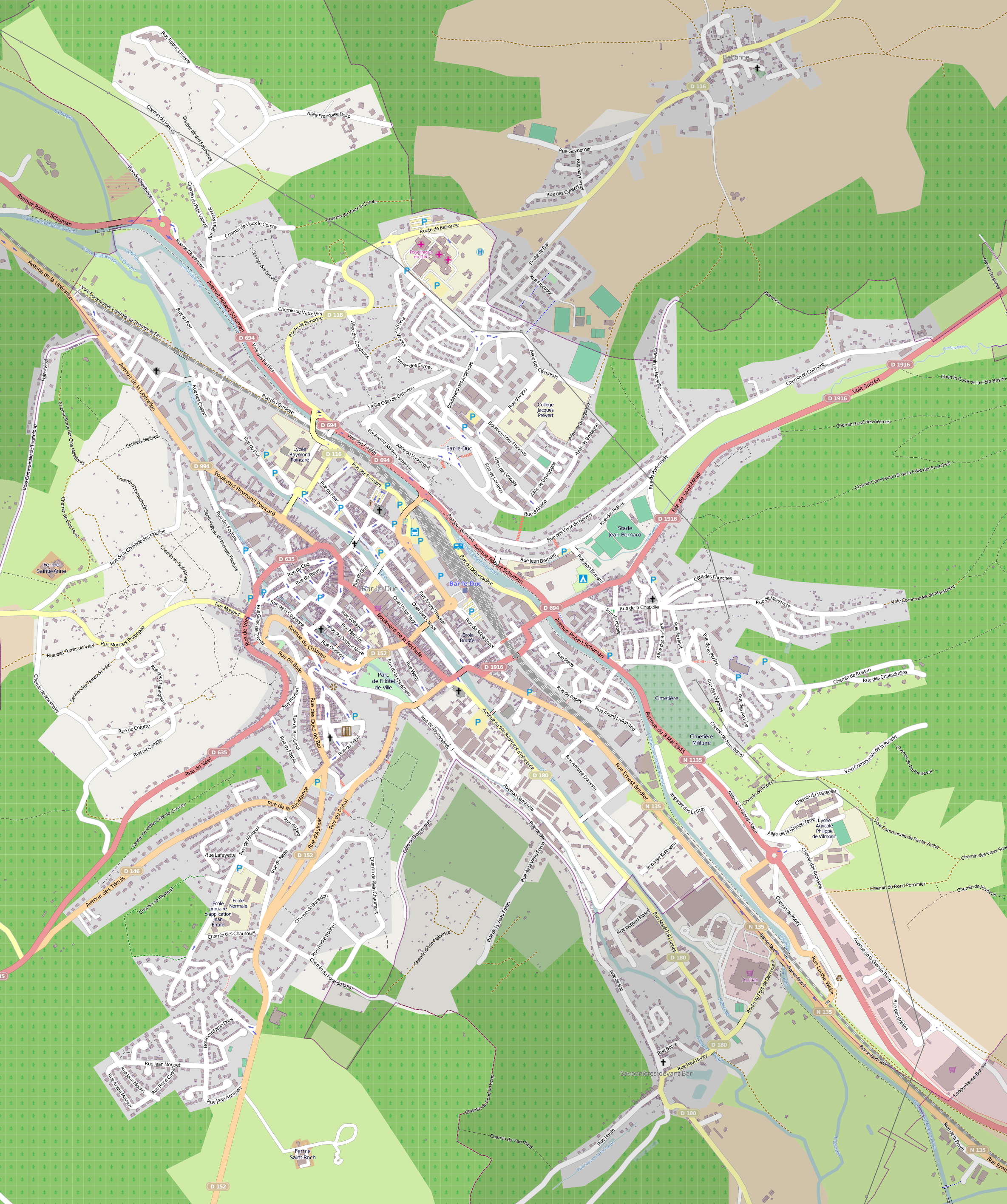 Plan de la commune de Bar-le-Duc (55000) avec OpenStreetMap.